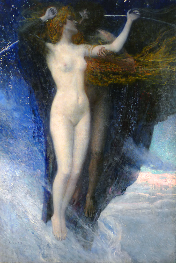 Ein Wiederfinder